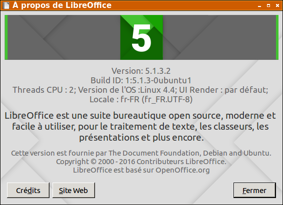 Capture d'écran de la fenêtre "à propos" de "Libre Office" (logiciel libre), en français, qui inclut un résumé de ce que fait ce logiciel.